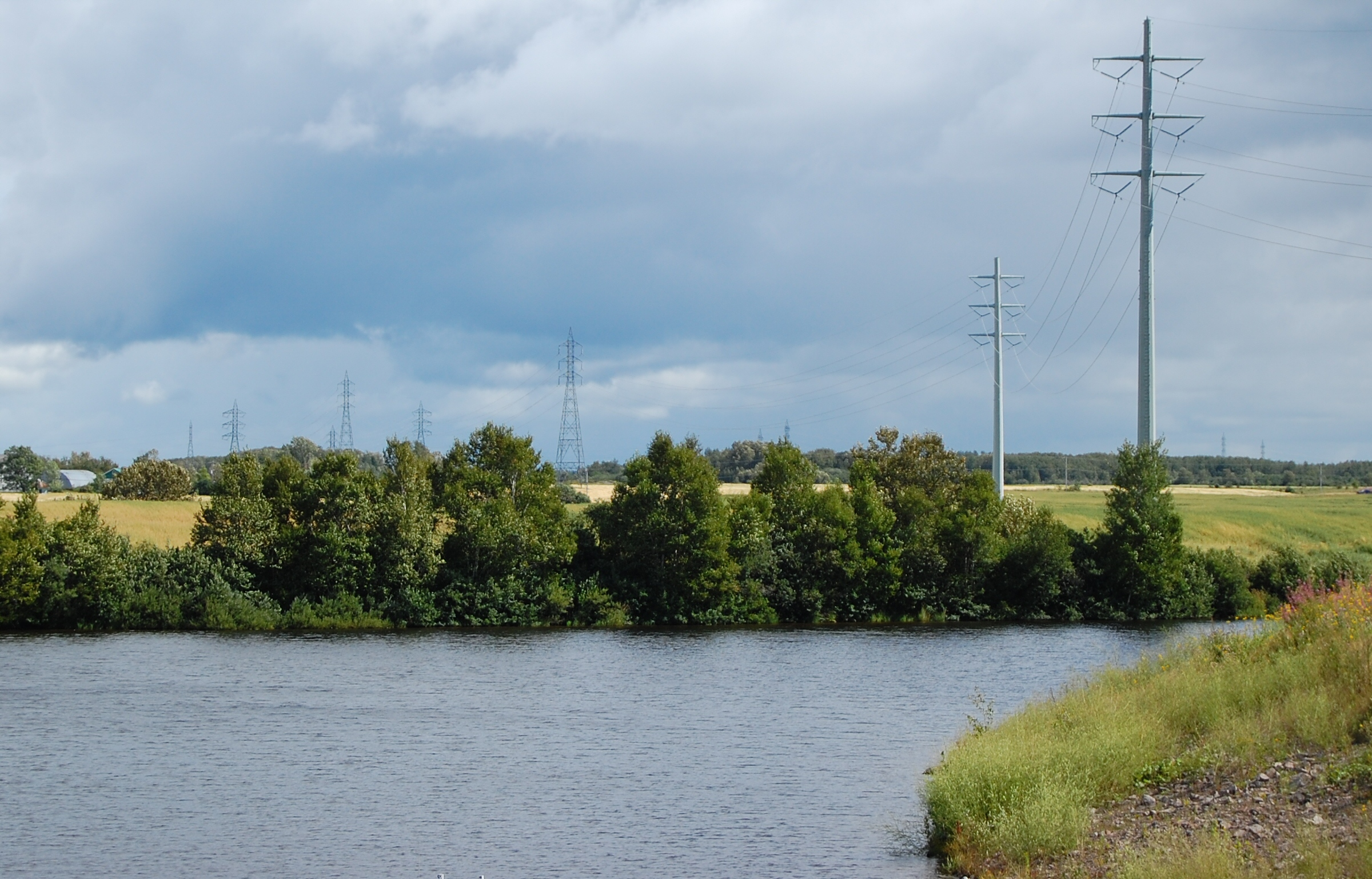 La rivière Chicoutimi près du rang St-Paul